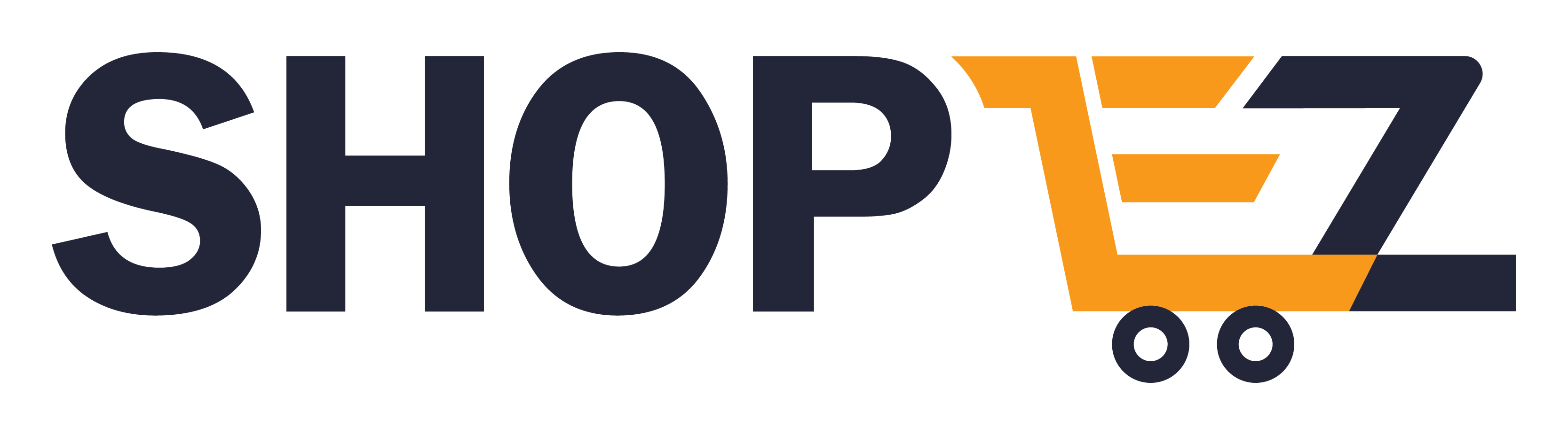 Logo